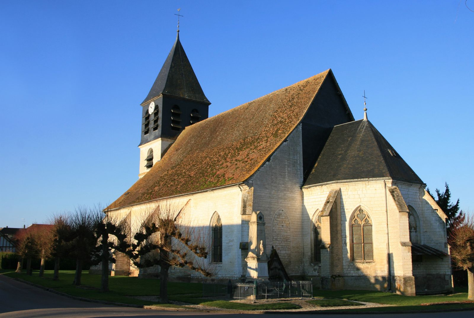 église de Chennegy.